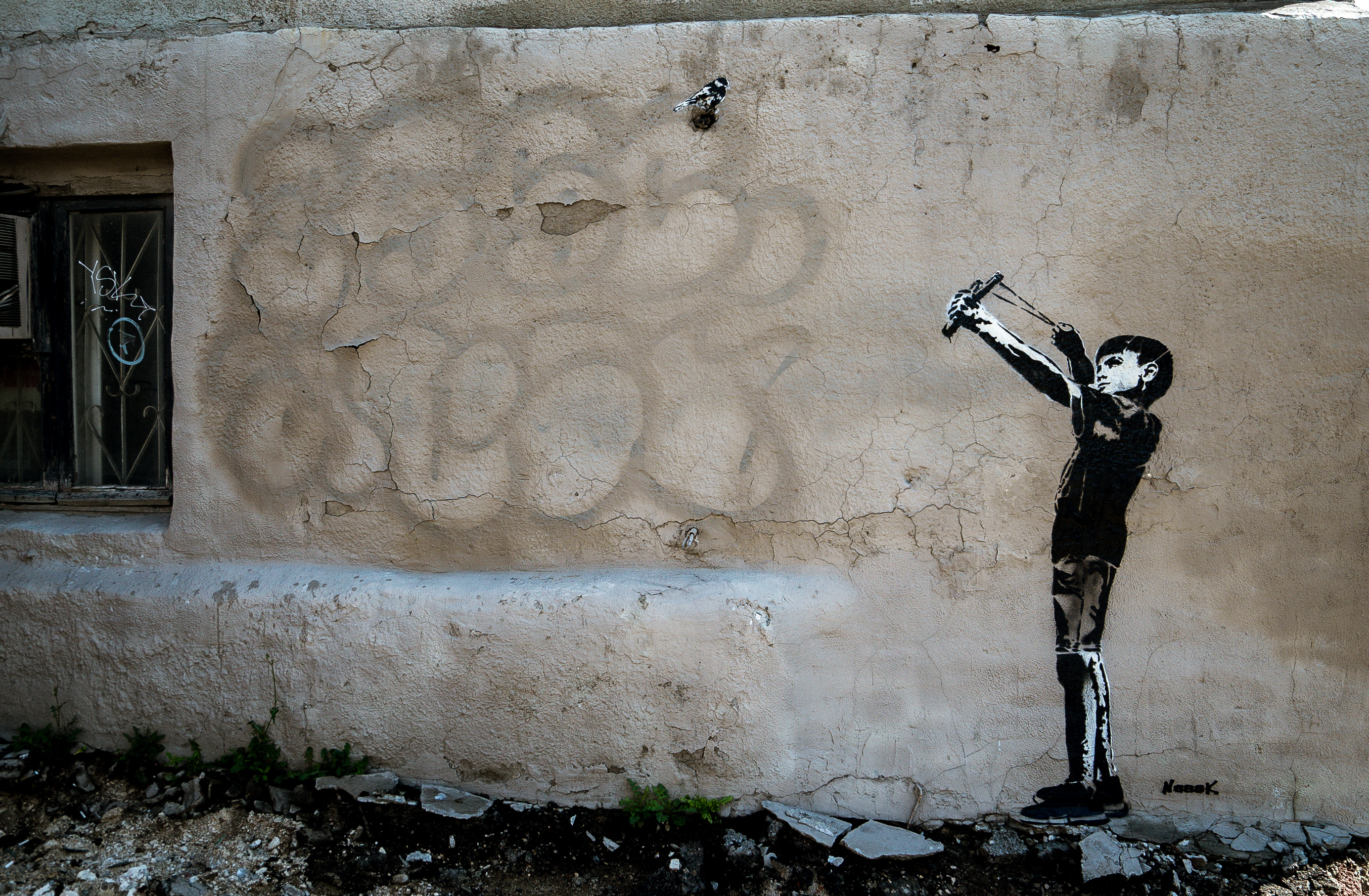 Одна из работ сделанных в рамках нелегального партизанского стрит-арт фестиваля «Карт-бланш». Екатеринбург 2019 год.